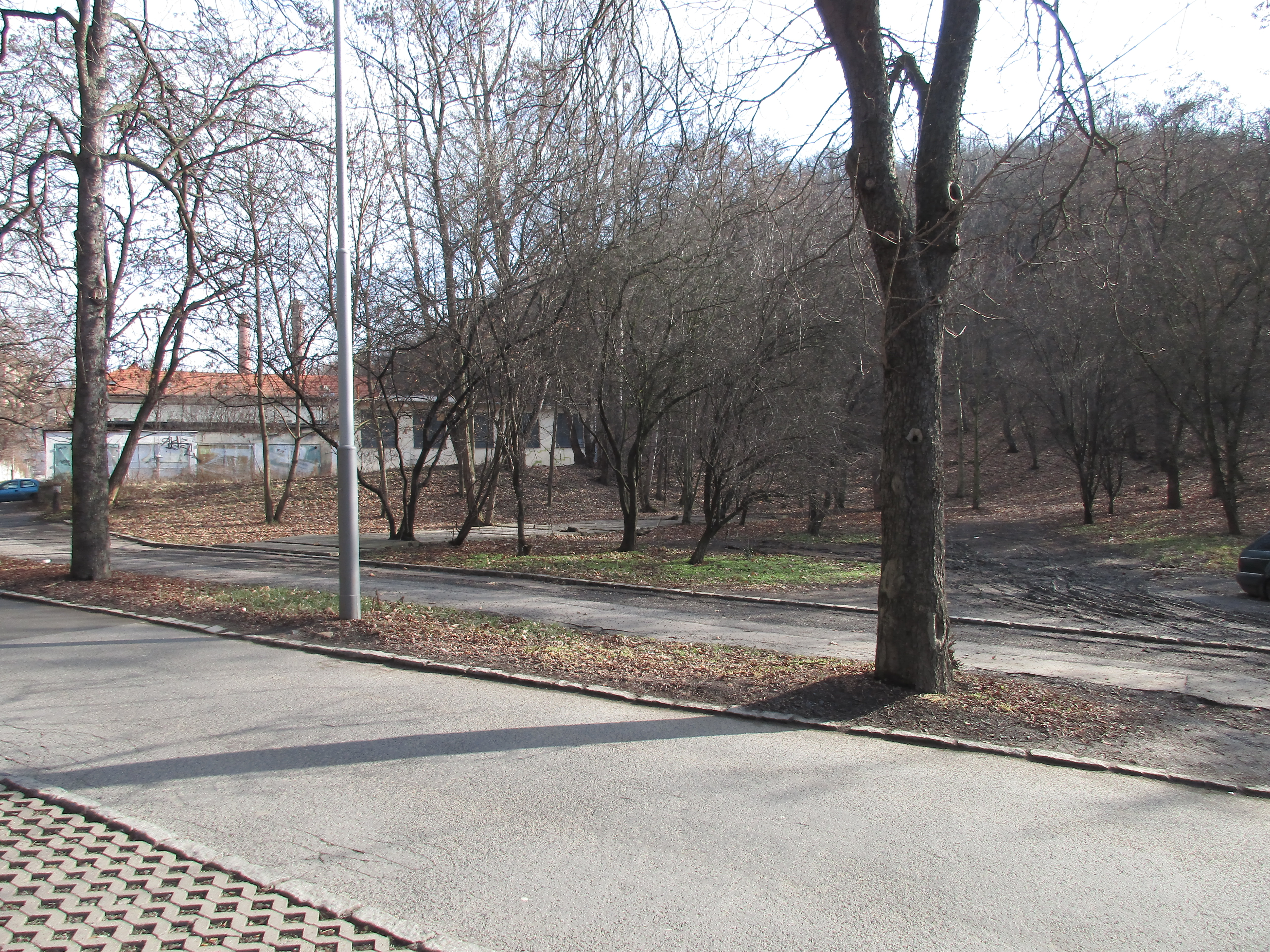 Ulice Bulovka v Libni v místech zaniklé usedlosti.